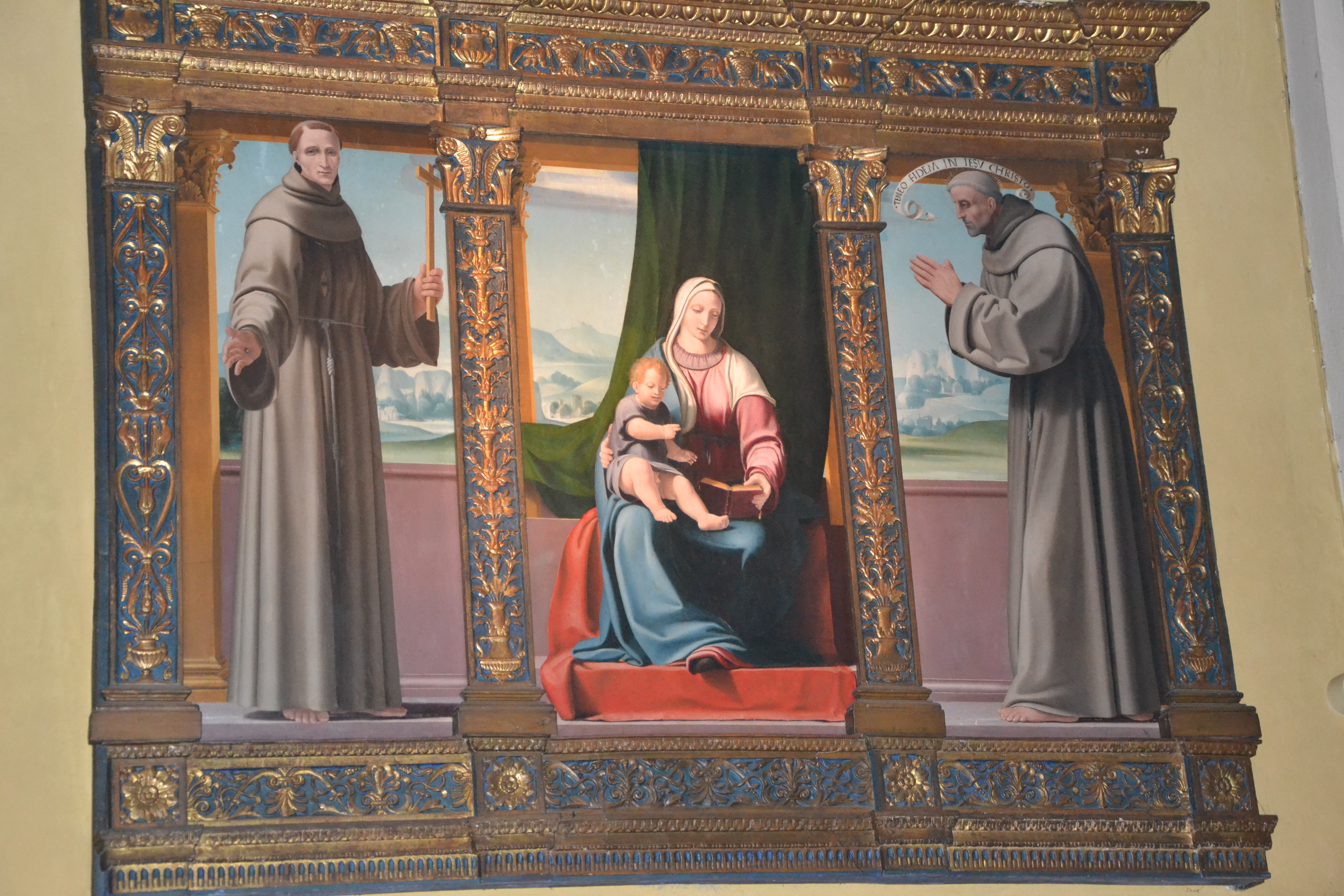 chiesa dei Santi Filippo e Giacomo (Castelleone CR), trittico con figure di S. Francesco, Madonna con bambino, Beato Amedeo Menez de Silva, tempera su tavola attribuita a Pedro Fernadèz da Murcia (Pseudo Bramantino), 1517-1518 circa, con cornice coeva. Il trittico faceva parte di un polittico (le altre quattro tavole sono conservate nel Museo civico di Cremona) ed era collocato sull’altare maggiore di S. Maria in Bressanoro.